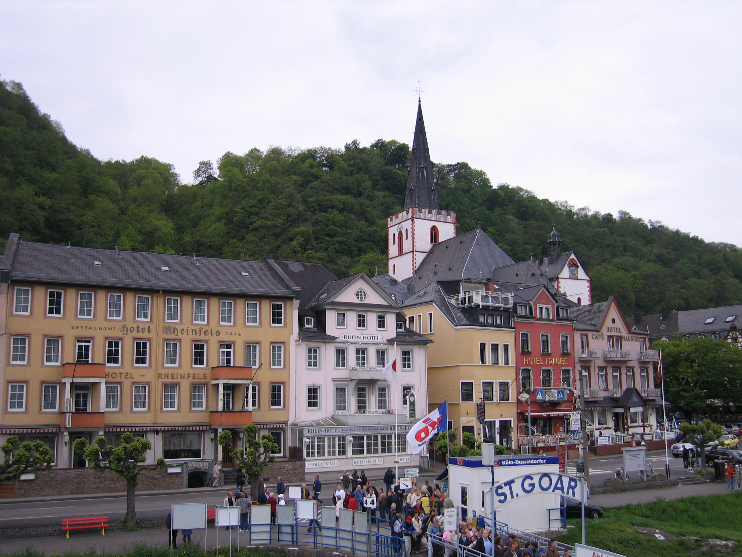 St. Goar